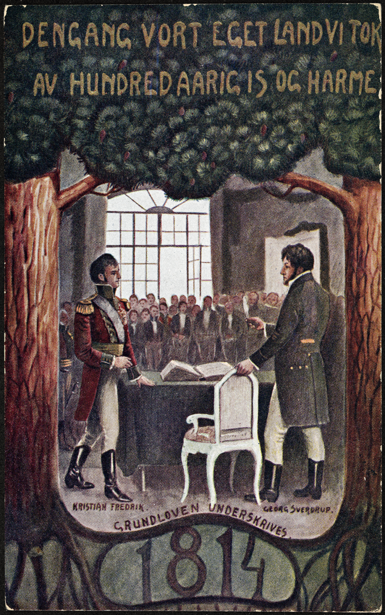 Tittel / Title: Dengang vort eget Land vi tok av hundredaarig Is og Harme : Grundloven underskrives Beskrivelse / Description: Postkort. Dato / Date: 1914 Kunstner / Artist: ukjent / unknown Utgiver / Publisher: M. & Co. Eier / Owner Institution: Nasjonalbiblioteket / National Library of Norway Lenke / Link: Bildesignatur / Image Number: blds_05714